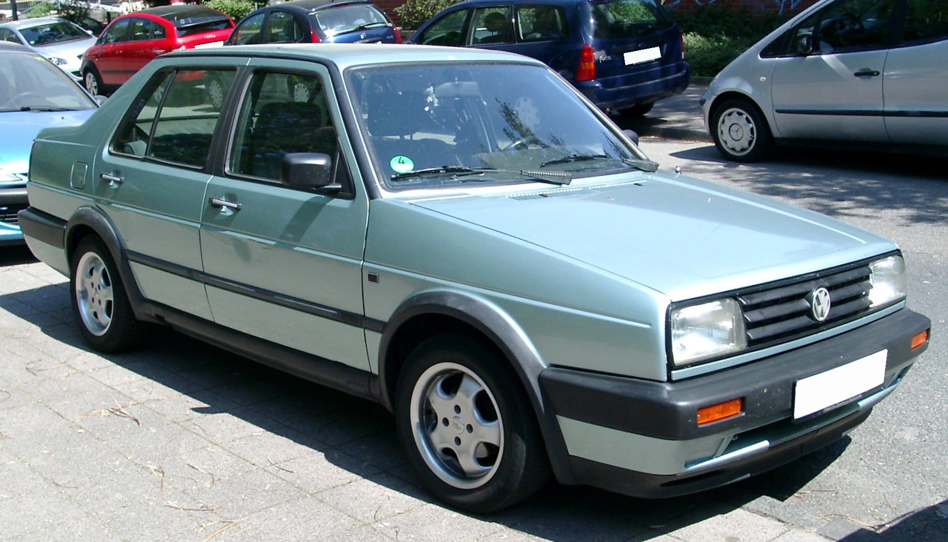 VW Jetta